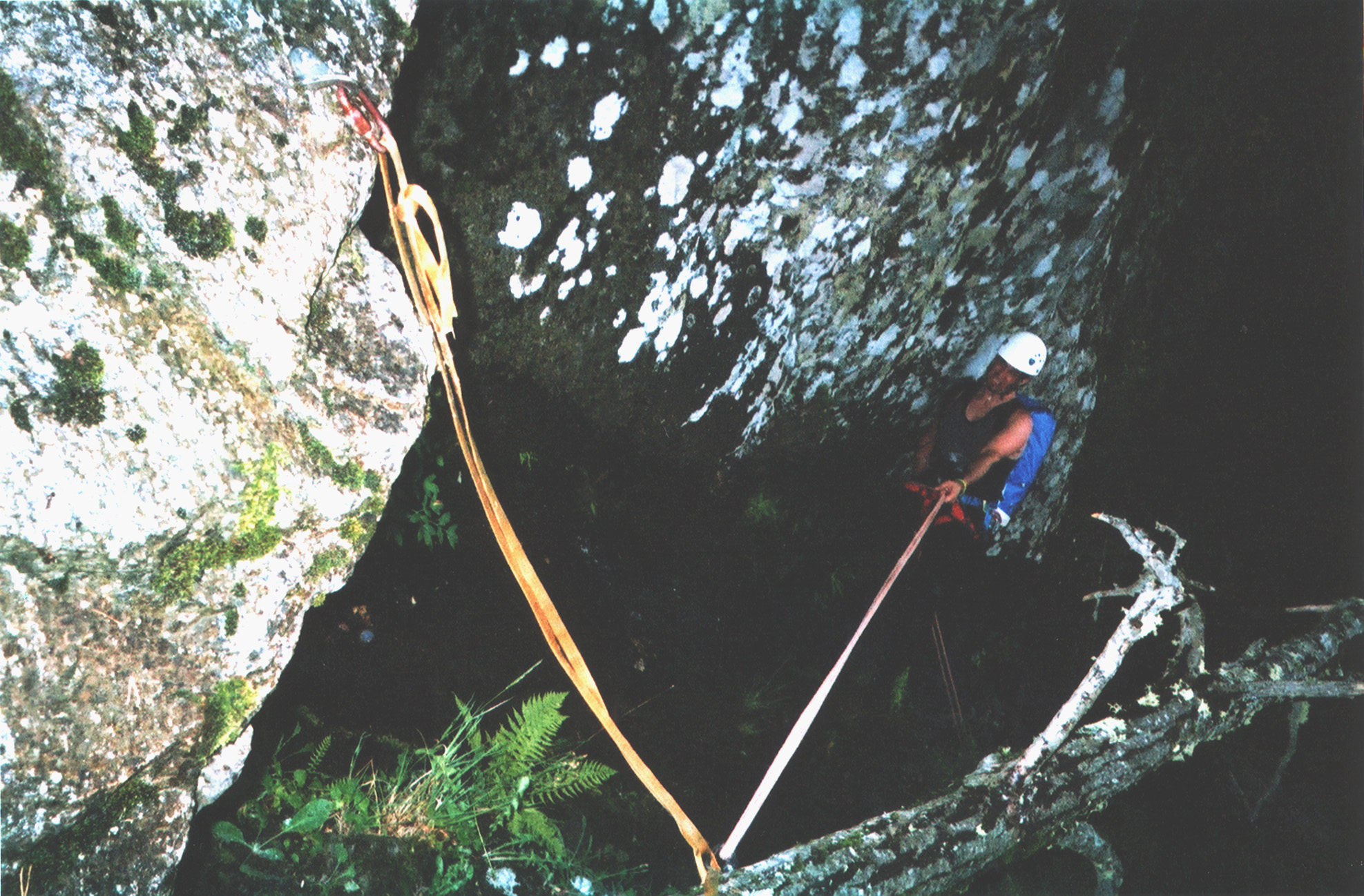 Descente en rappel sur arbre mort Auteur : Alice Sous gfdl Utilisateur:Ralph juin 2003